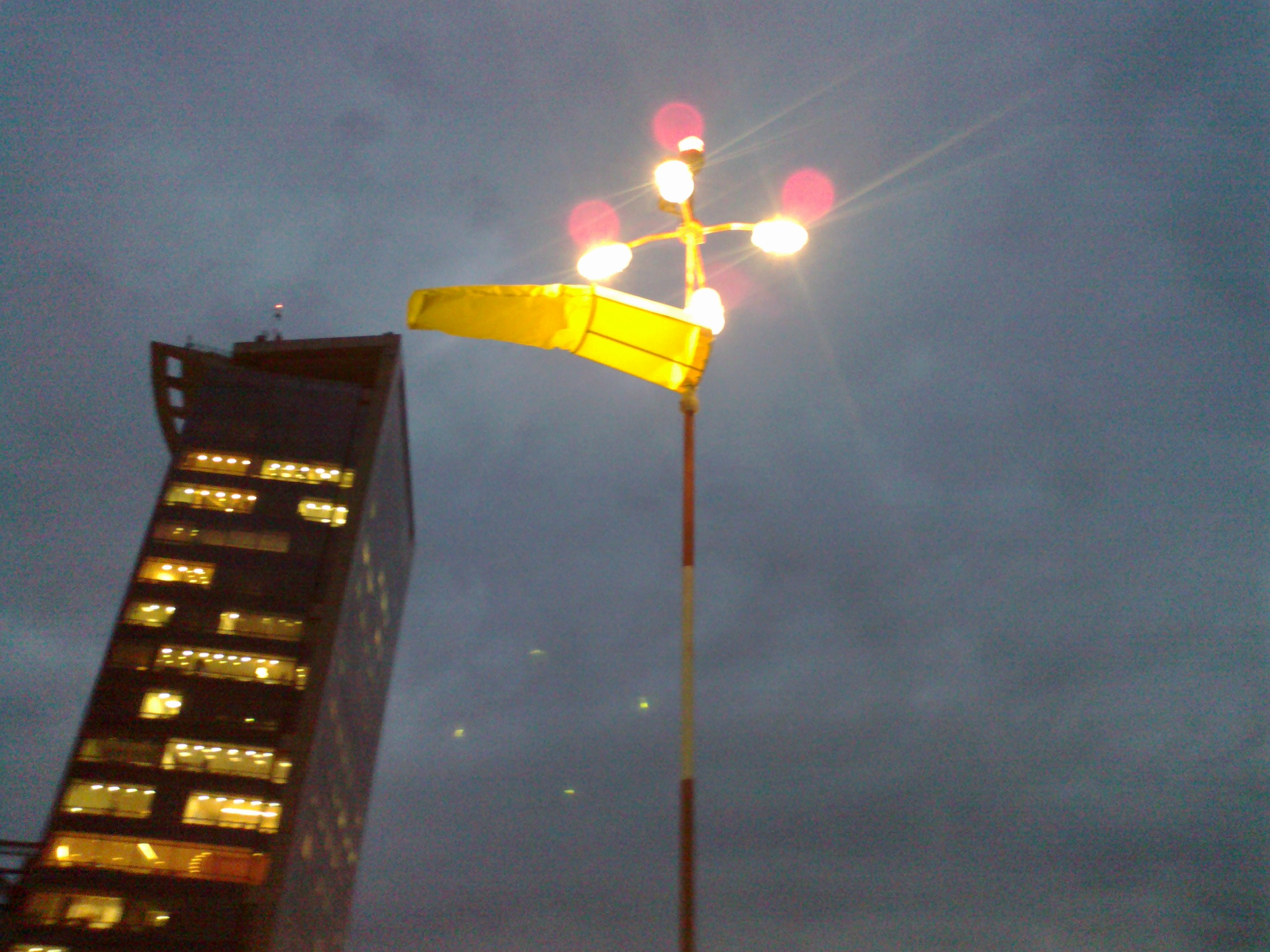 Uma Biruta Completa com Iluminação Externa